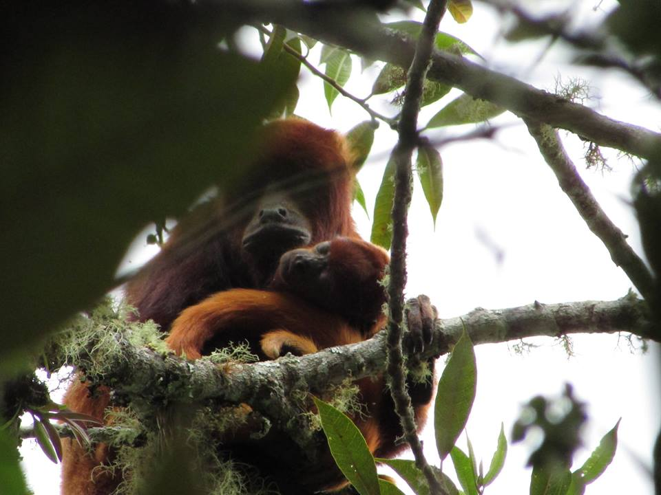 Fauna de Jaén, Perú